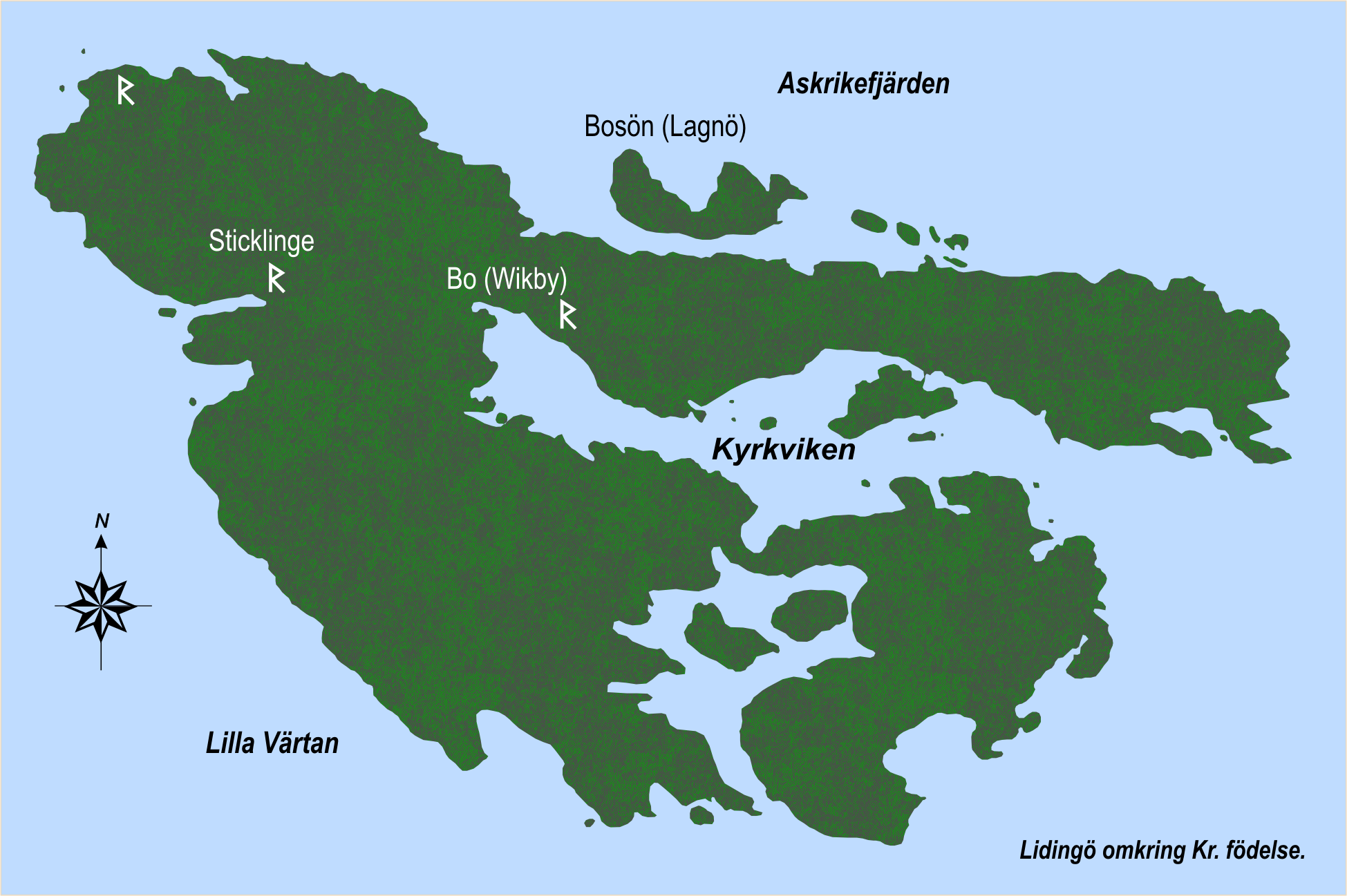 Lidingös ungefärliga landkontur vid Kristi födelse. Baserat på utställningsmaterial framtaget Lidingö museum om Lidingö under forntiden och justerat uppskattning av landkontur vid tiden omkring Kristi födelse.